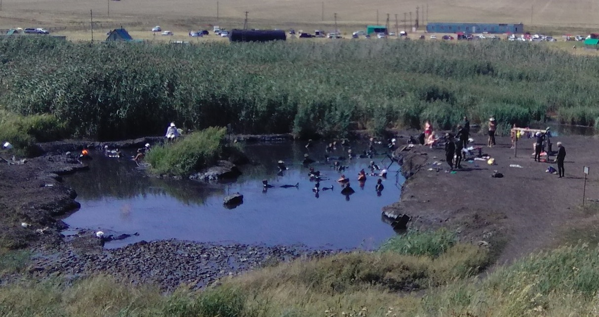 Башҡортса: Баҡортостан. Көйөргәҙе районы. Шифалы ләм менән дауаланырға килеүселәр күп.